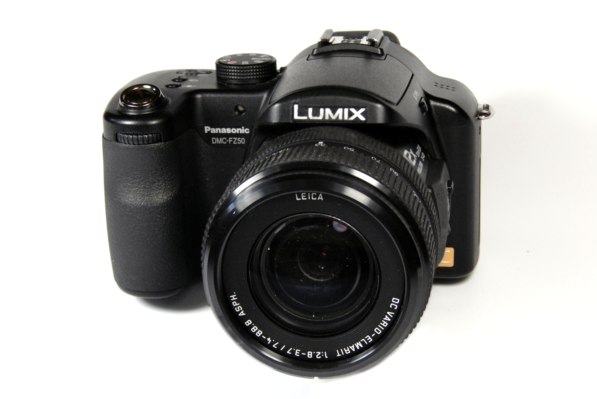 Vorderansicht der Panasonic Lumix DMC FZ50